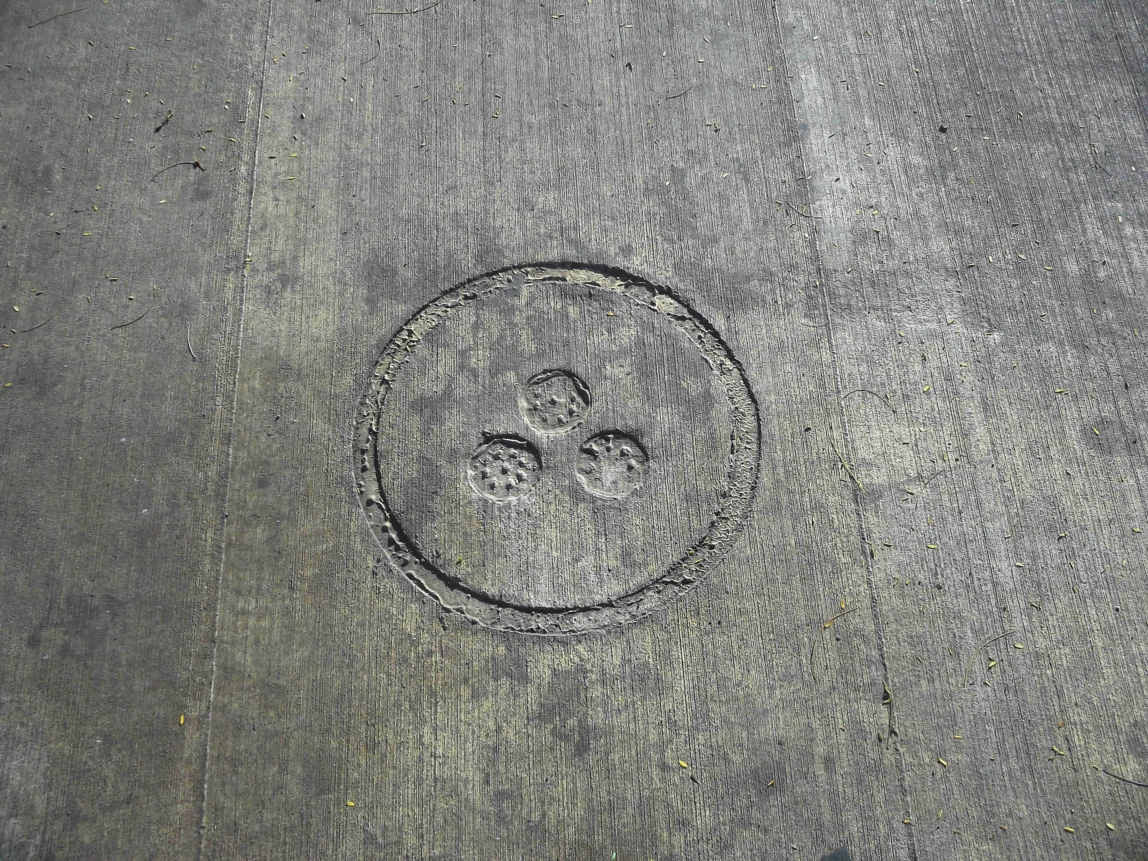 Símbolo de la Paz, Mérida, Yucatán.